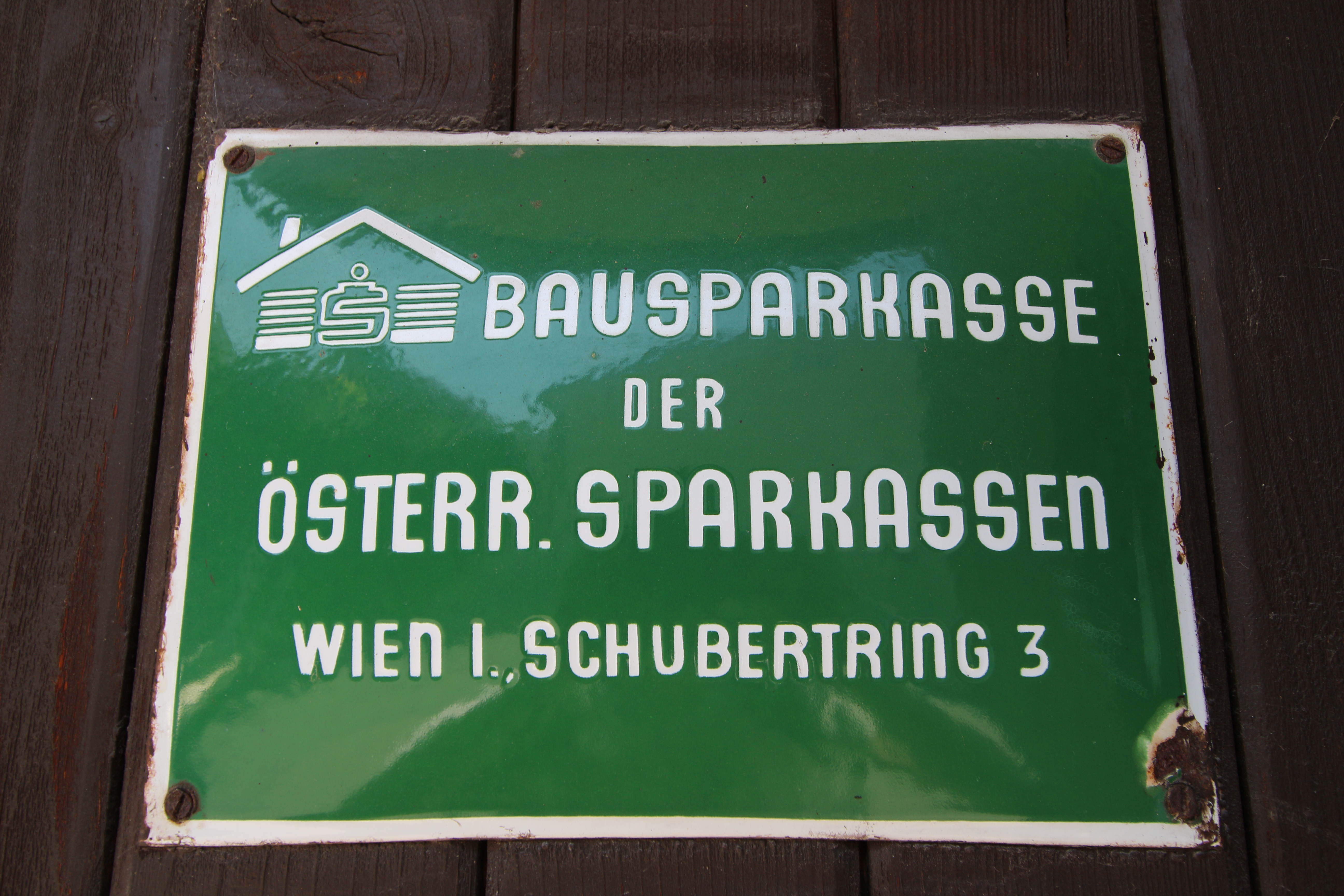 Kellergasse "Obere Kellergasse" in Gänserndorf, Niederösterreich.